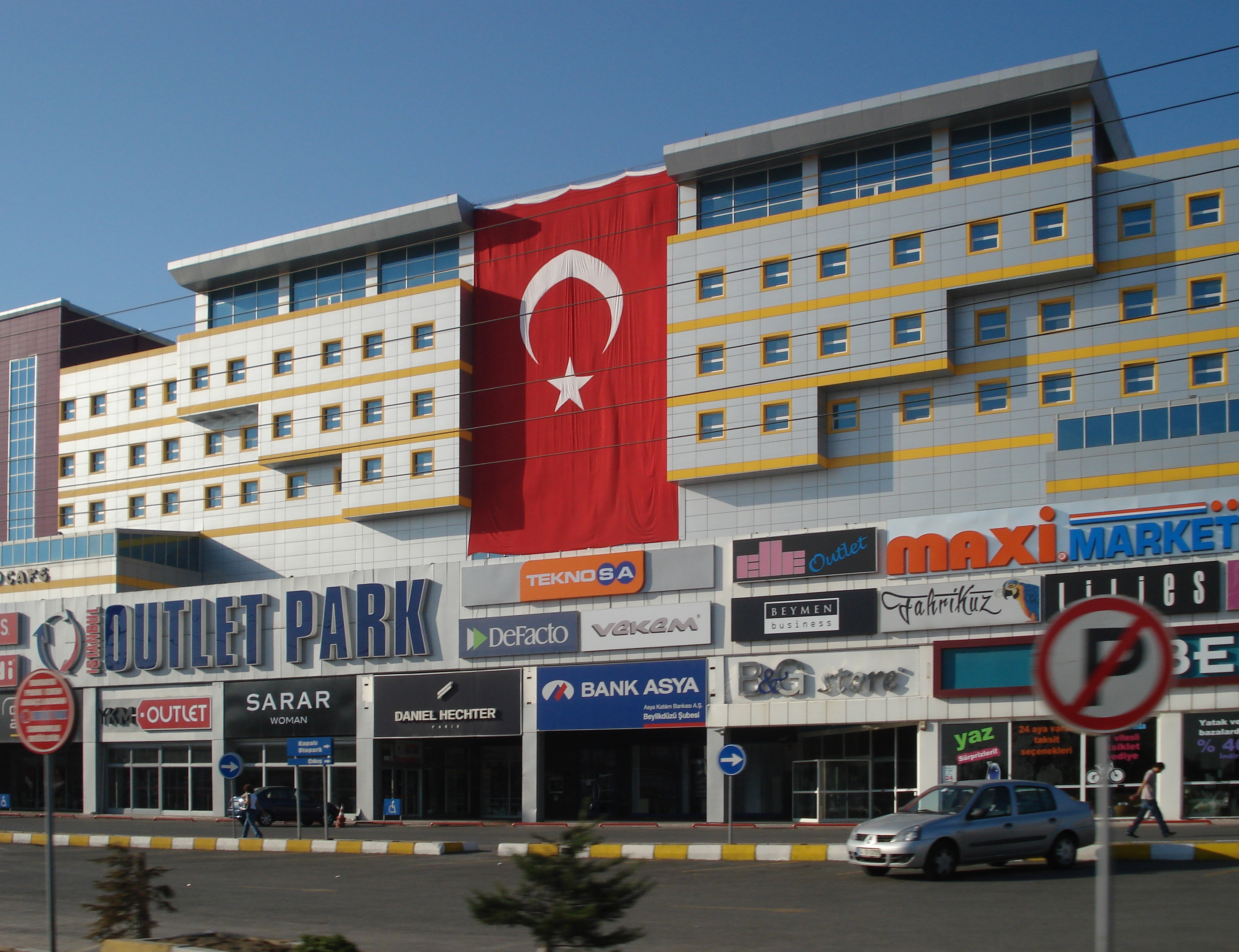 The Outlet Park in Büyükçekmece in İstanbul